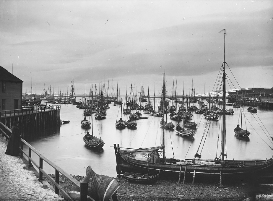 Wessel, Ellisif Rannveig Havnen i Vardø. NMFF.002141